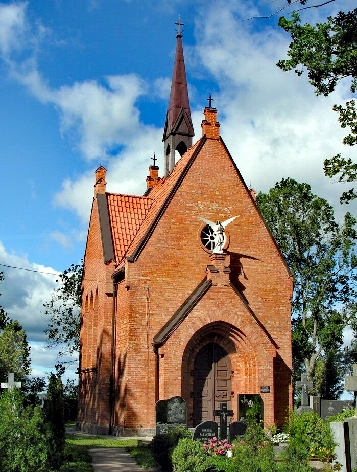 Žemaitėška: Rašytuojės Marijės Pečkauskātės Šatrėjės Raganas kuoplyčė Žėdėku kapūs